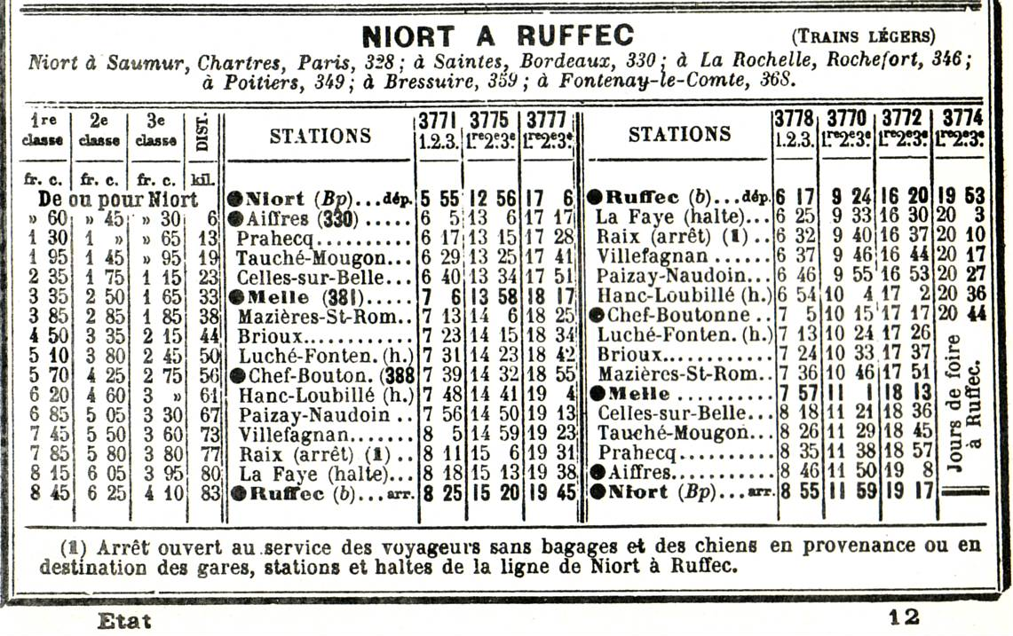 Extrait du Livret Chaix (Mai 1914) : Ligne Niort à Ruffec